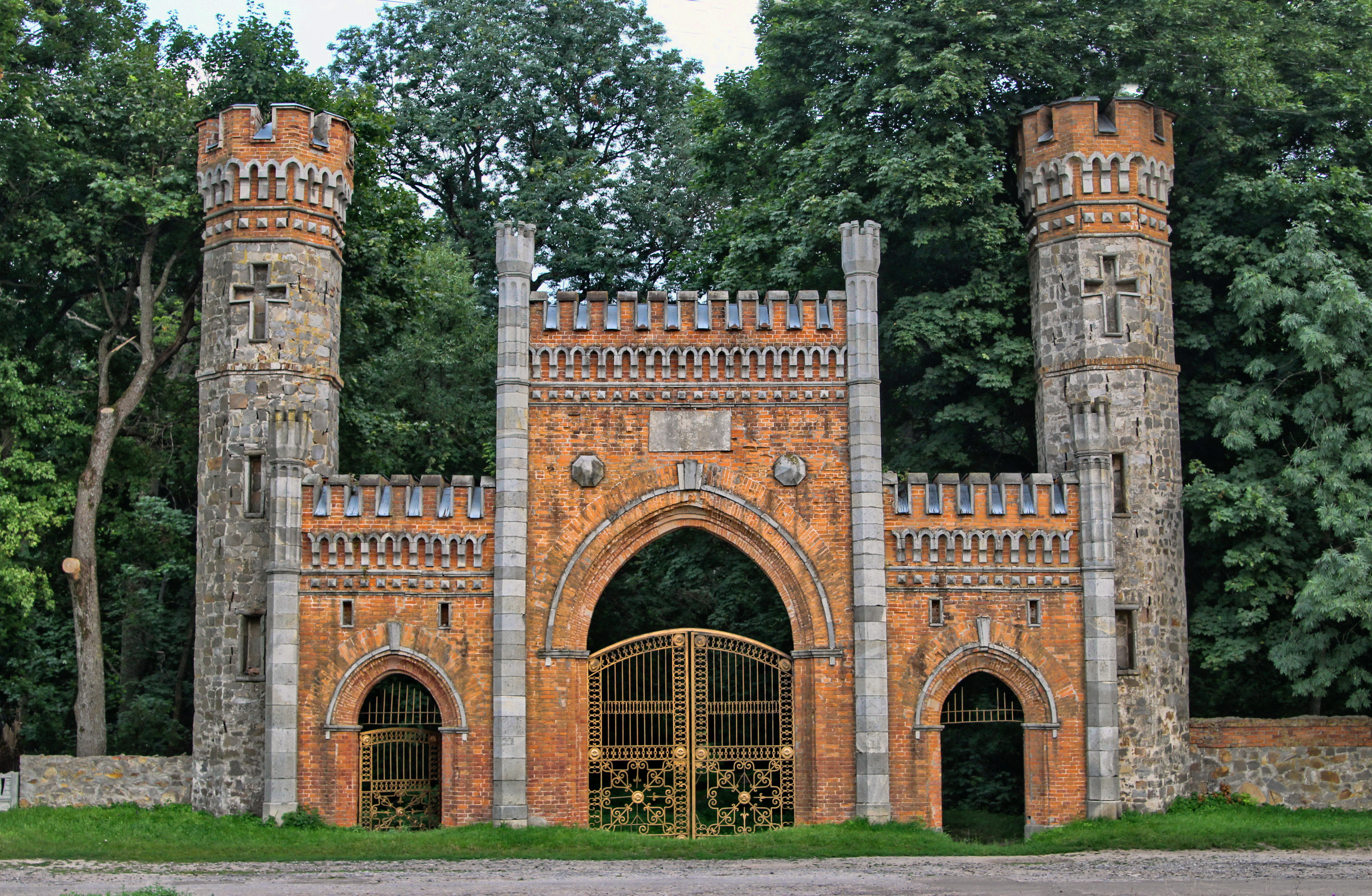 Палацо — парковий ансамбль садиби Миклашевських (Золоті ворота), Путивльський район, с. Волокитине